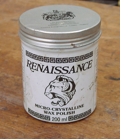 Renaissance Wax, 200ml tub